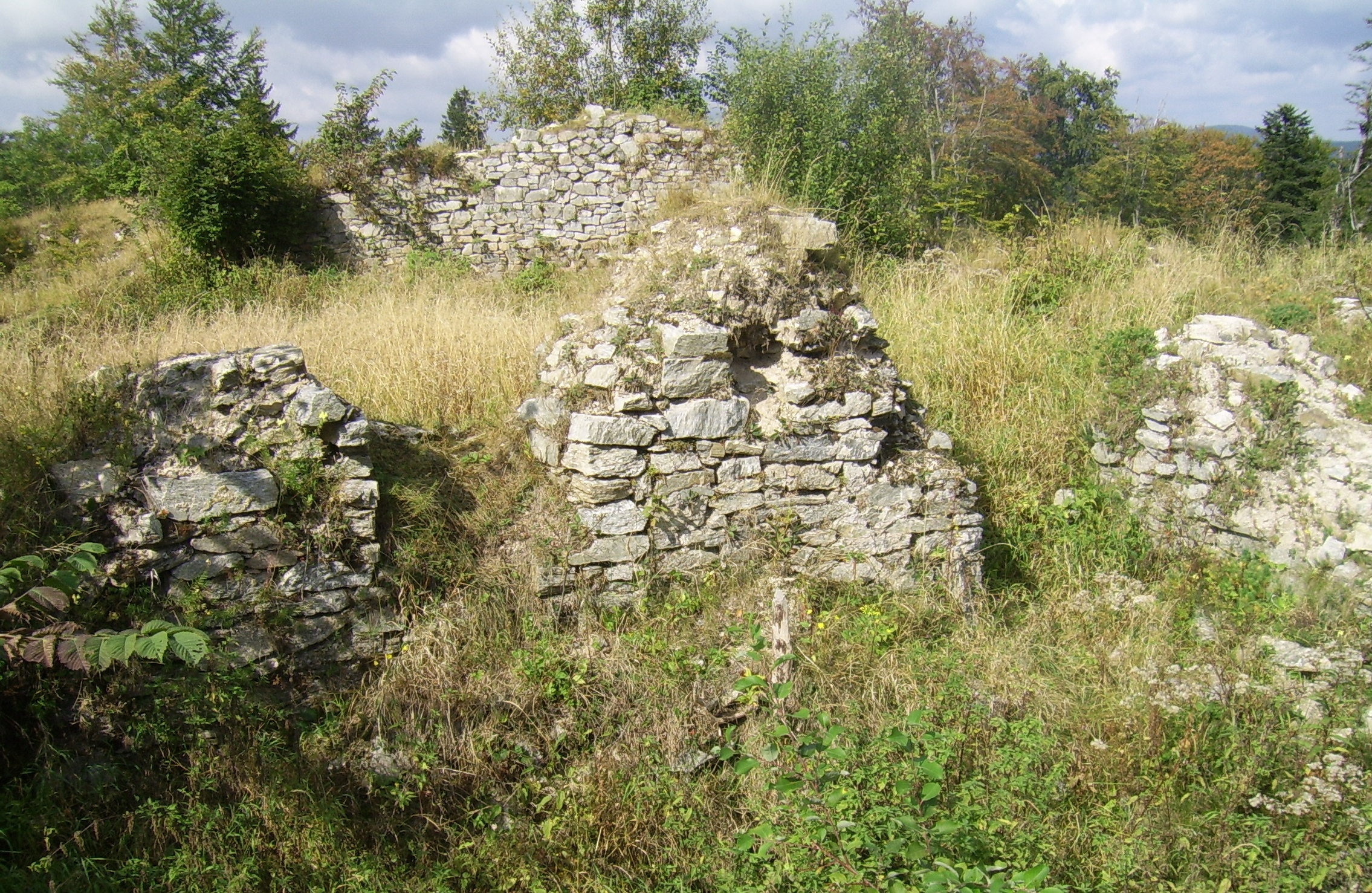 zamek „Karpień” (ruina), XIV-XV w., Karpno, gmina Lądek-Zdrój